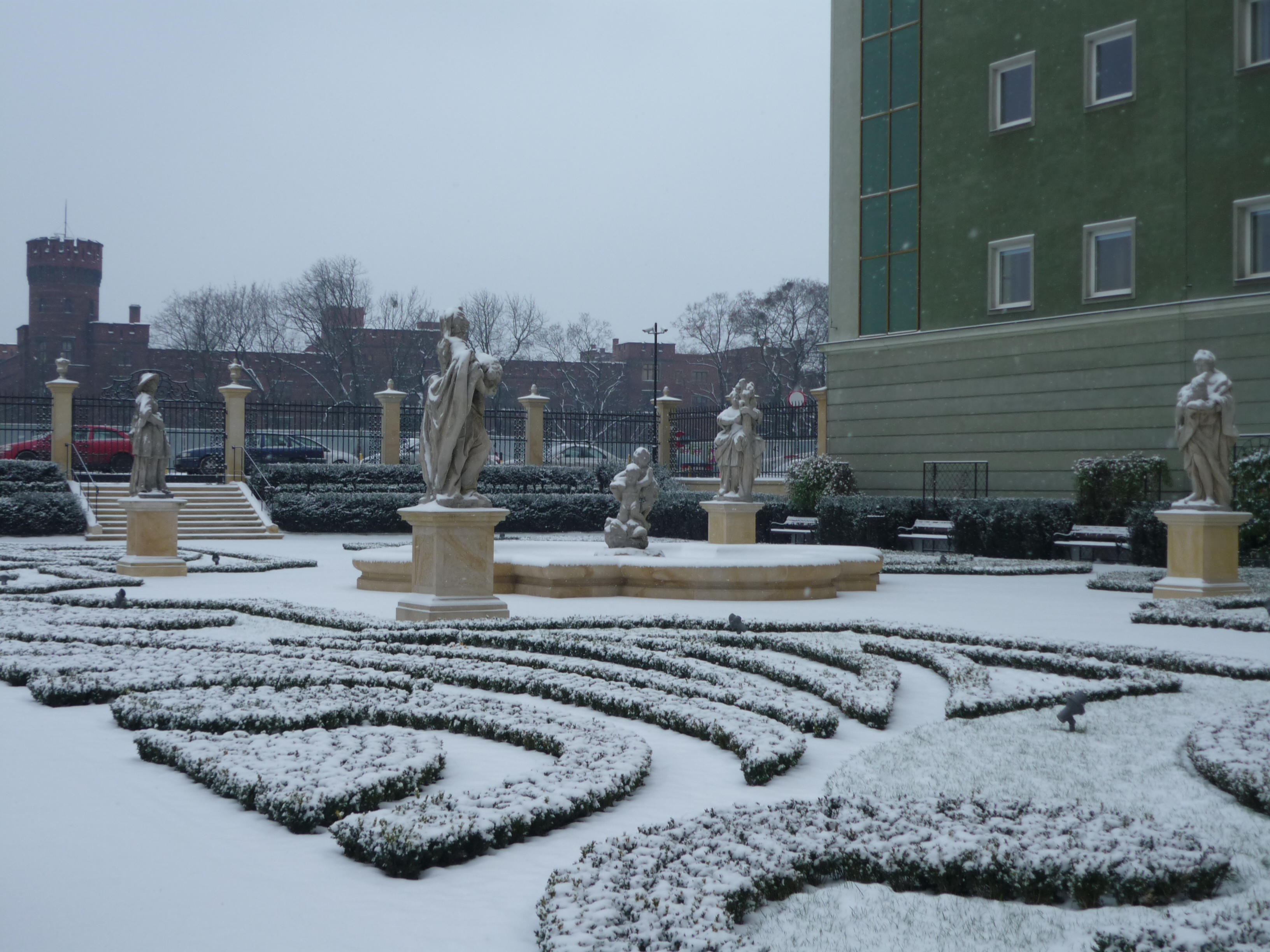 Ogród Barokowy przy Muzeum Miejskim Wrocławia